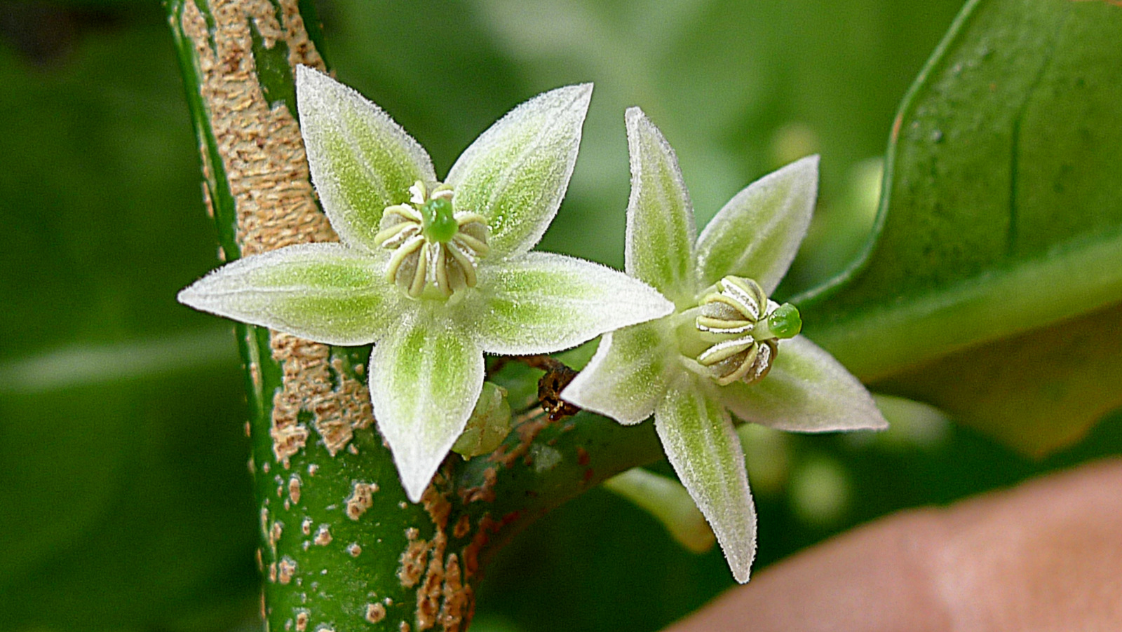 Aureliana fasciculata var. longifolia (Sendtn.) Hunz. & Barboza